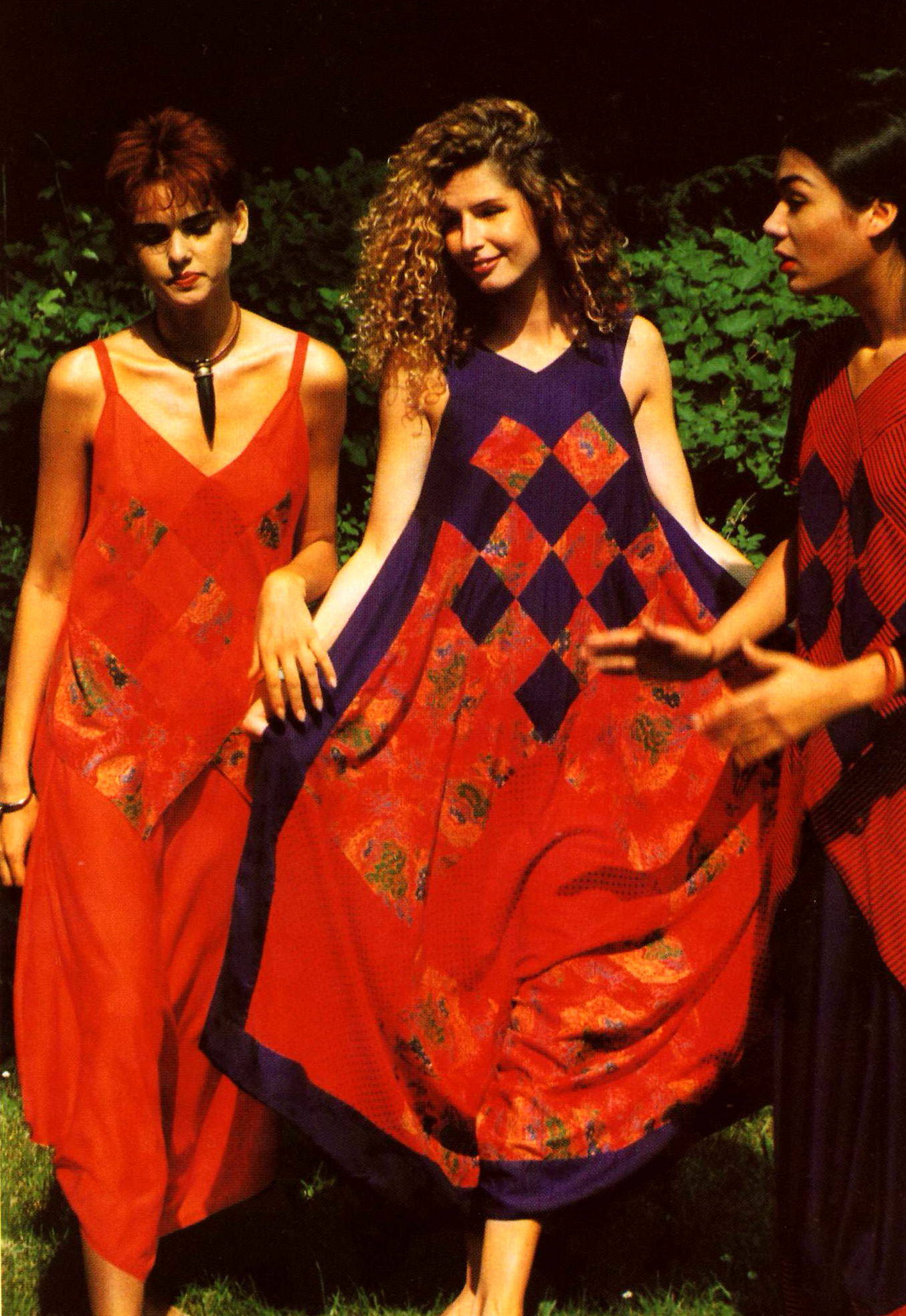 Sárváry Katalin divattervező ruhái egy székesfehérvári bemutatón (Patchwork ruhák, 1991)